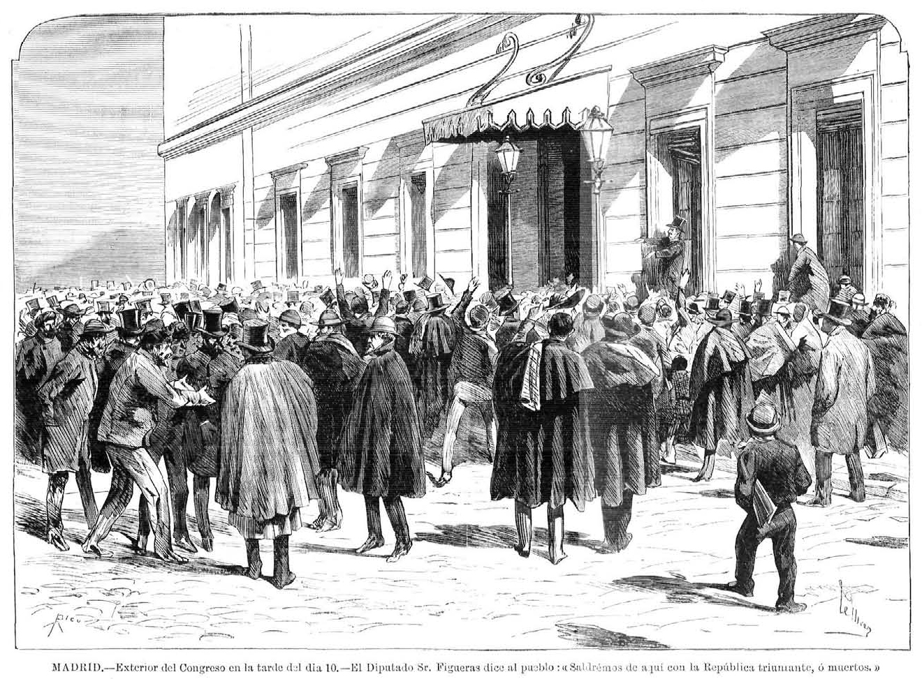 Exterior del Congreso en la tarde del día 10, el diputado Sr. Figueras dice al pueblo: «Saldremos de aquí con la República triunfante, o muertos», en la revista española La Ilustración Española y Americana.